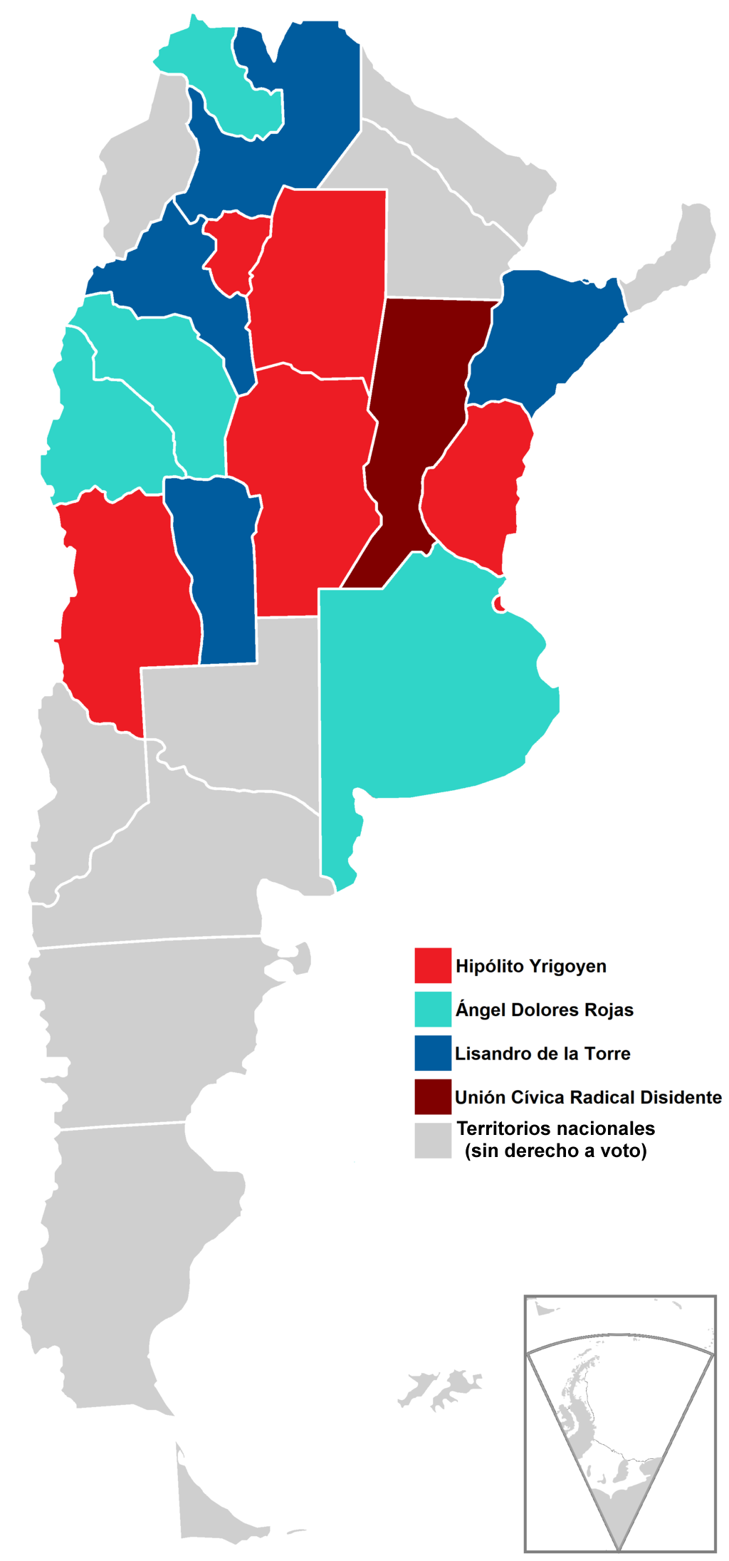 Resultado de las elecciones presidenciales de Argentina por candidato más votado en el Colegio Electoral.